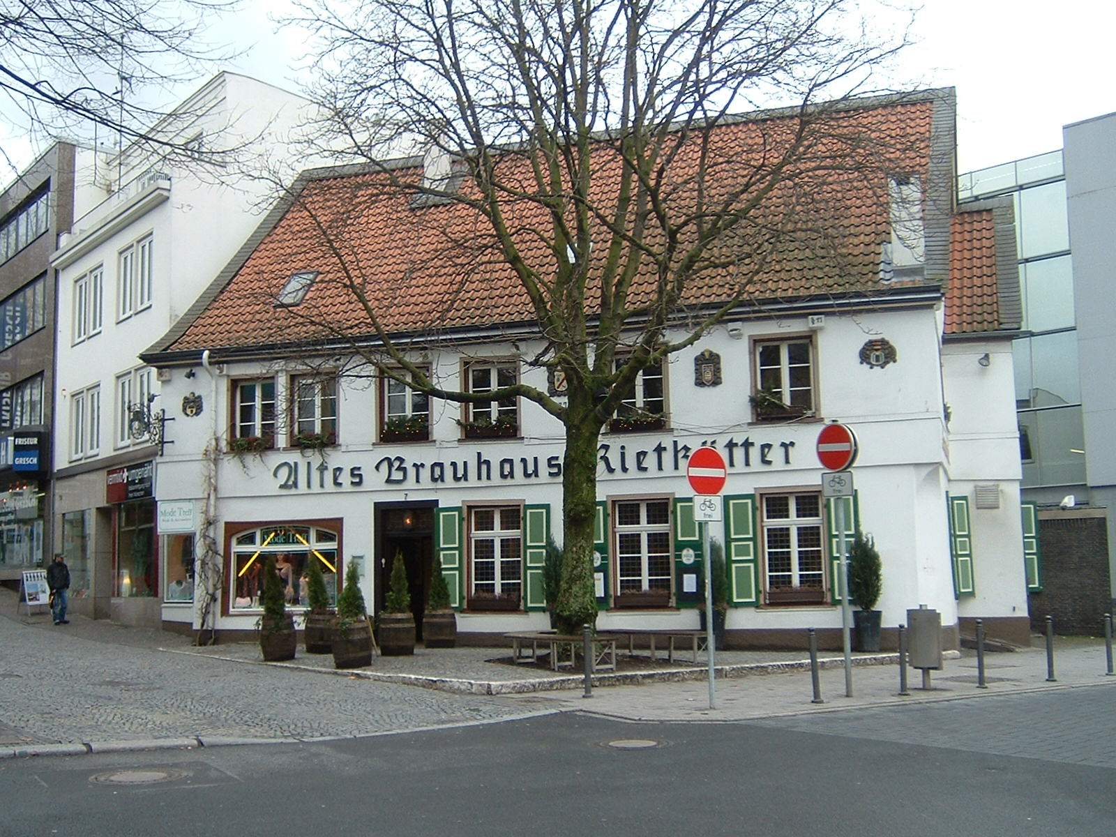 Altes Brauhaus Rietkötter